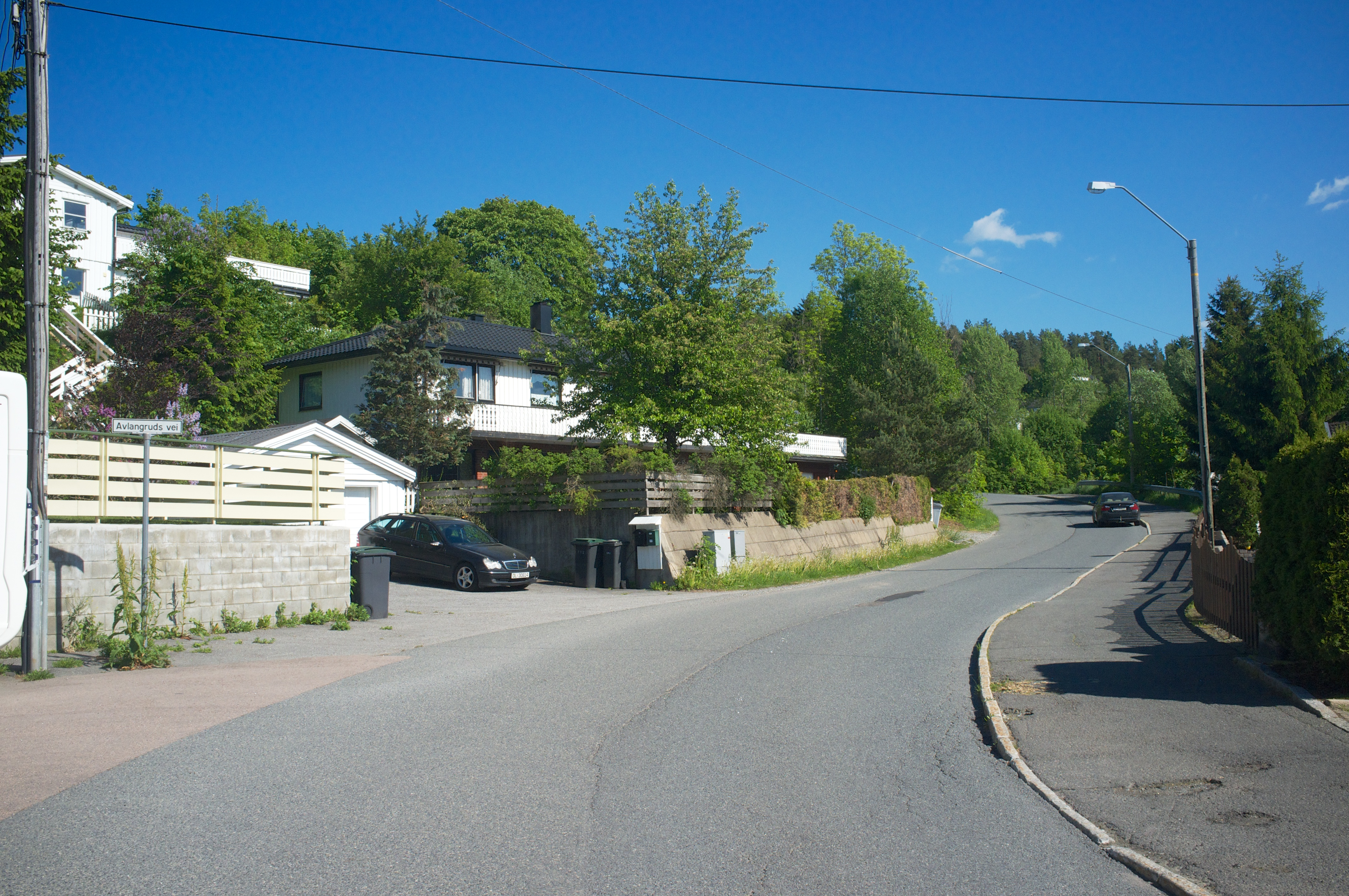 Avlangruds vei på Dal i Oslo.